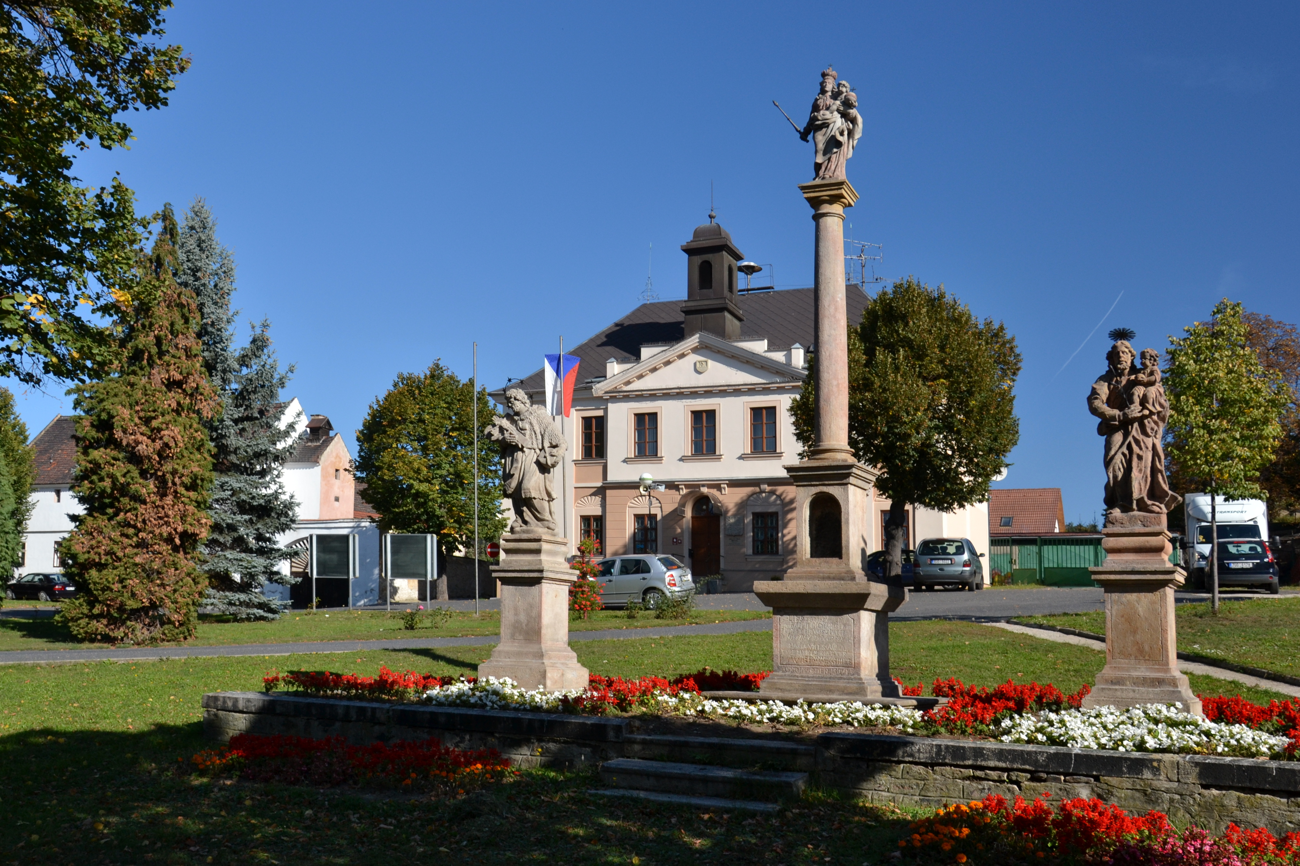 Sousoší P. Marie, sv. Jana Nepomuckého a sv. Josefa (Březno), Březno